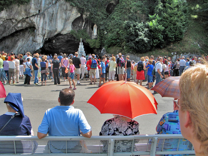 Lourdes Grott vu Massabielle.